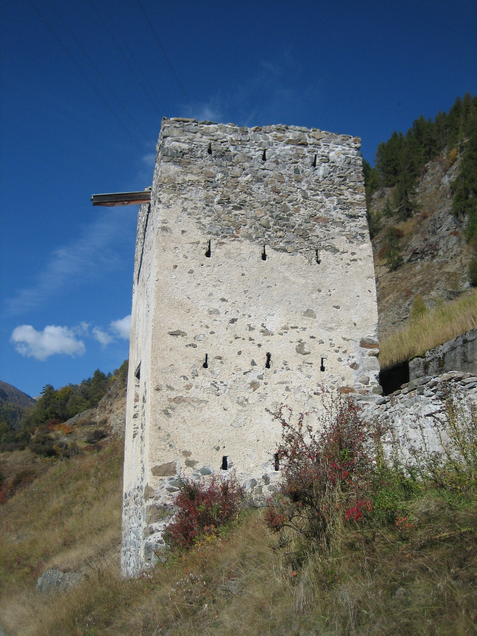 Turm von La Serra bei Zernez, nordwärts